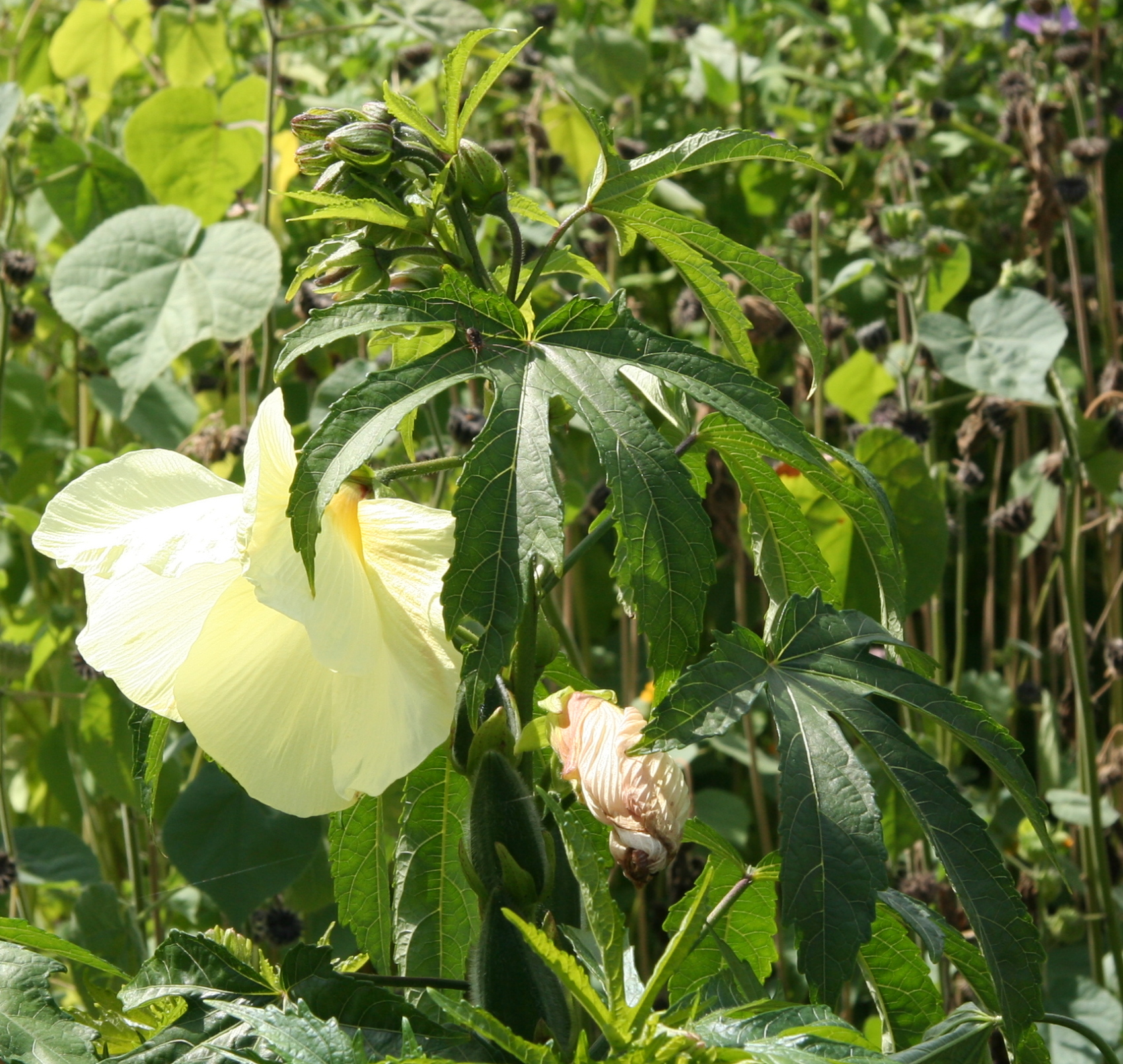 Abelmoschus manihot im Botanischen Garten Dresden